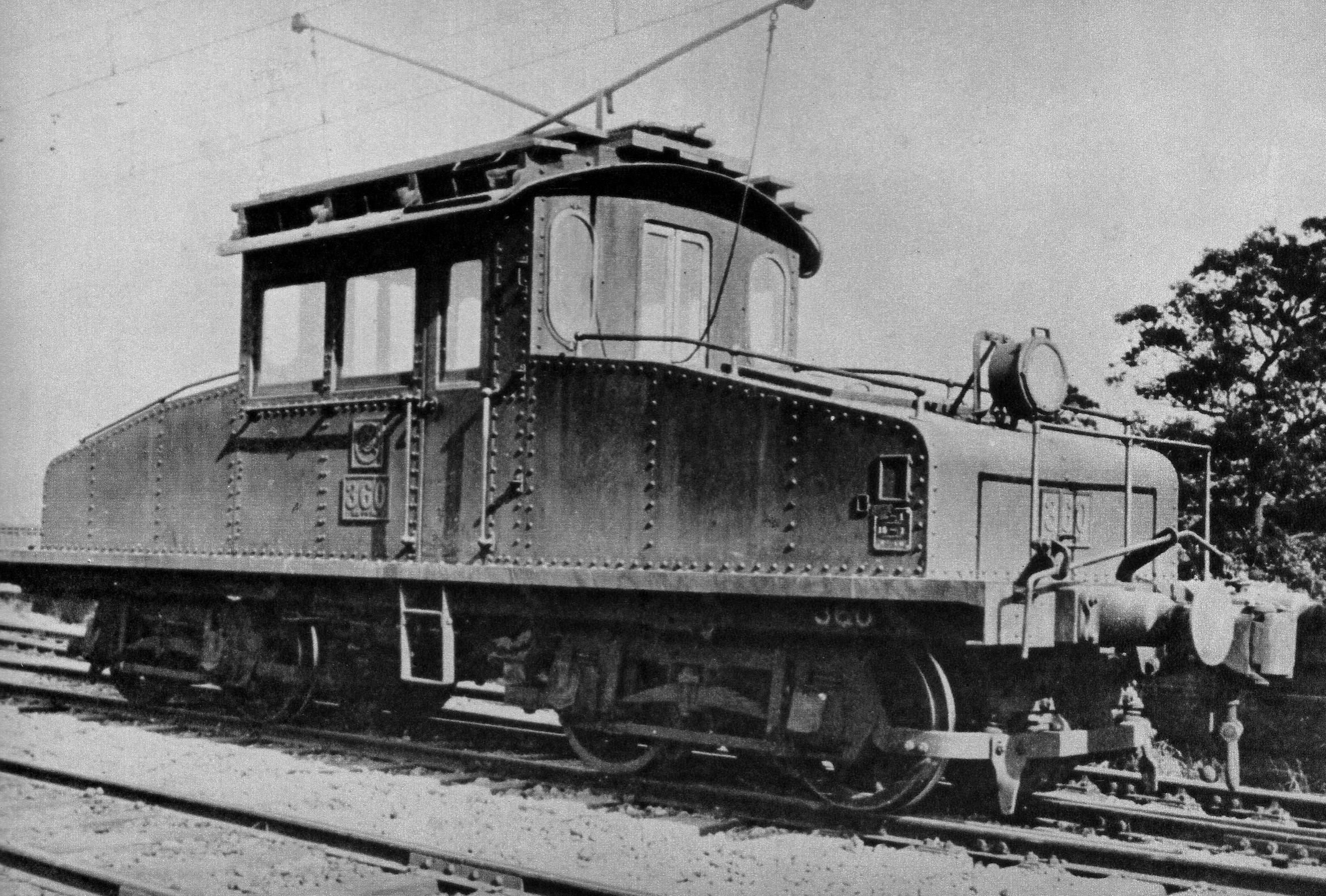 愛電デキ360形